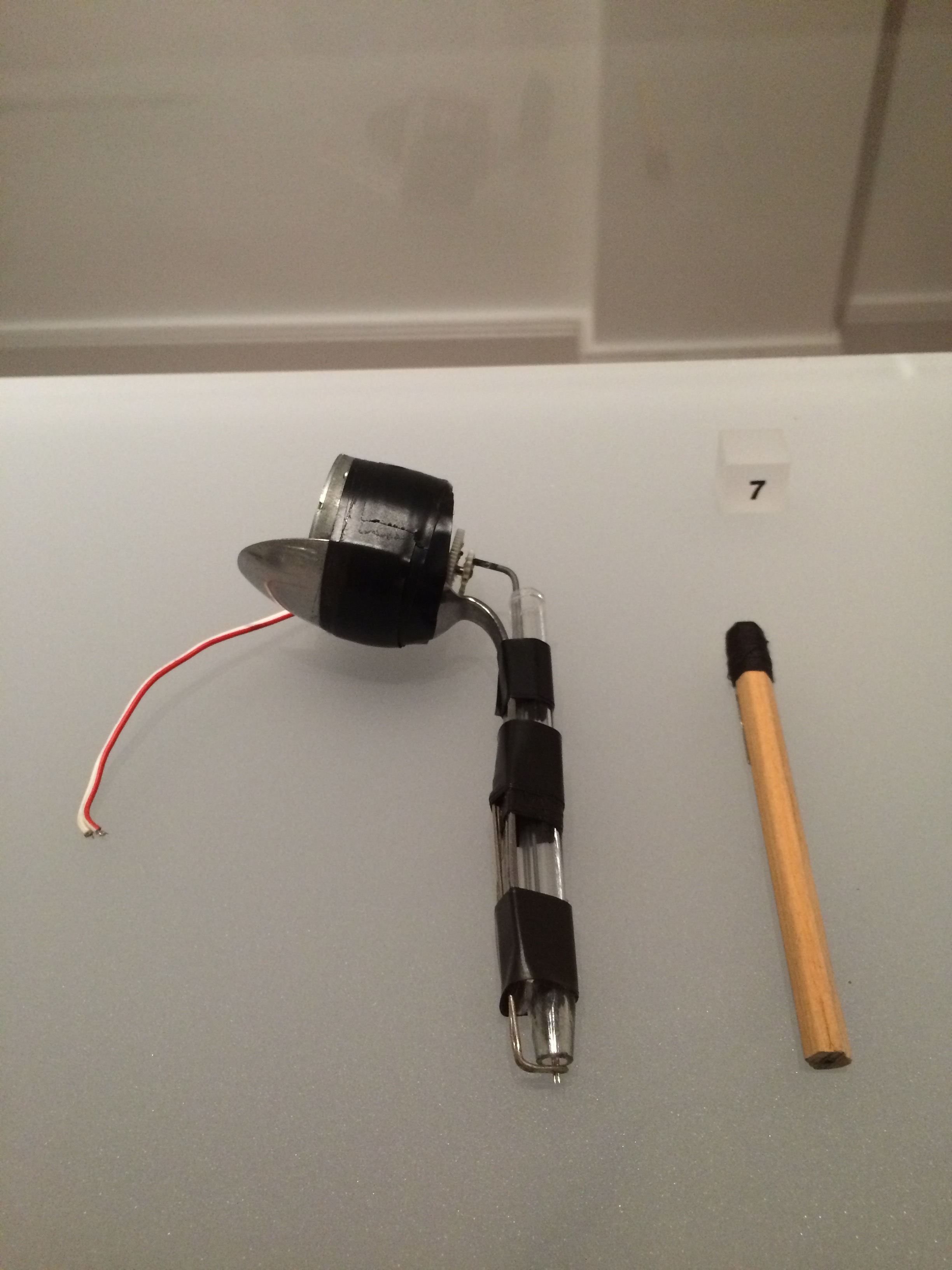 Aus Alltagsgegenstaänden gefertigte Tätowiermaschine. Ausstellung "Tattoo" im MKG Hamburg 2015